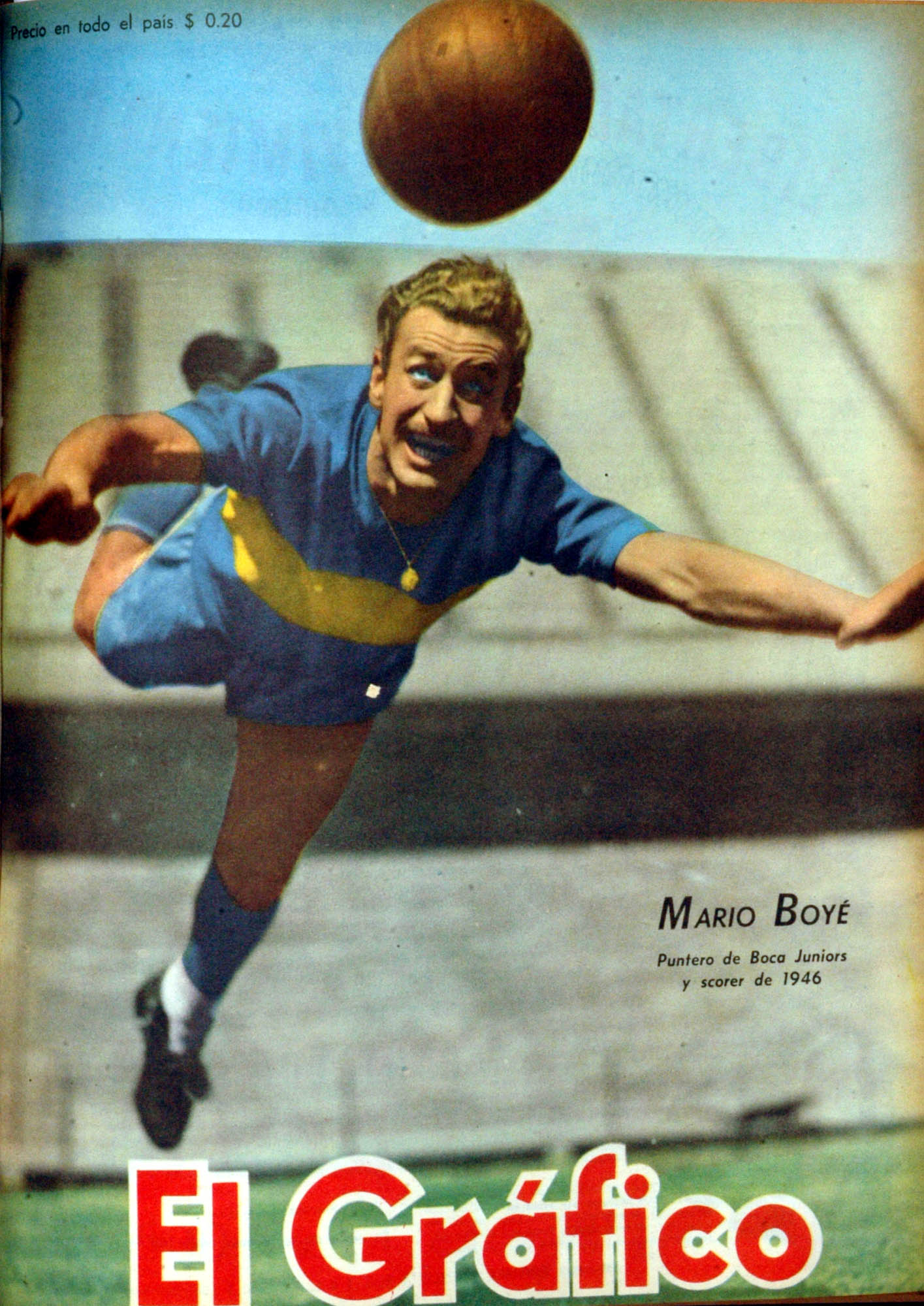 El Grafico del 10 de Enero de 1947. Edicion 1435